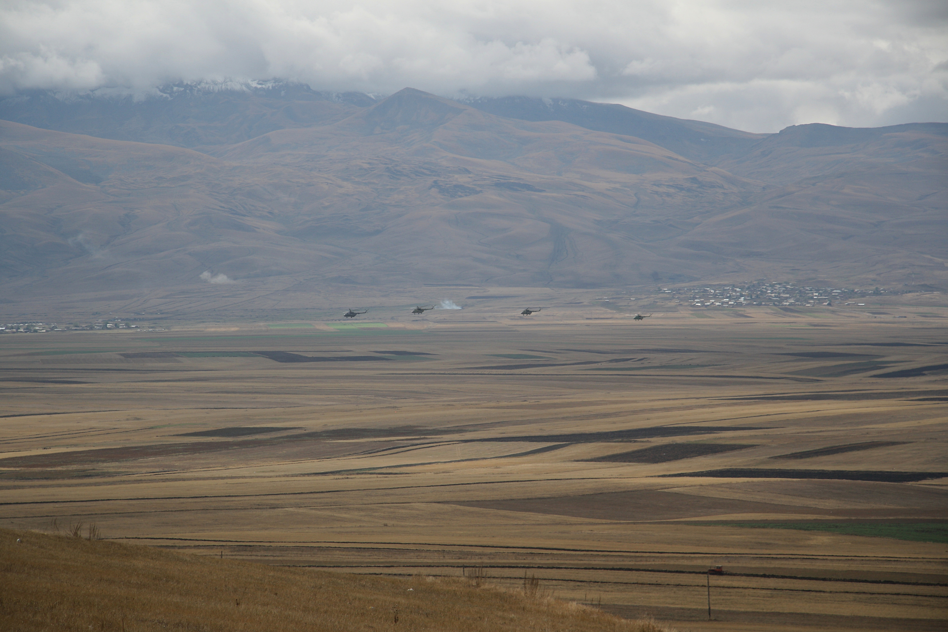 Blick vom Spitak-Pass auf eine agrarisch geprägte Hochebene, die gerade von Militärhubschraubern überflogen wird. Dahinter in Wolken das Aragatz-Massiv